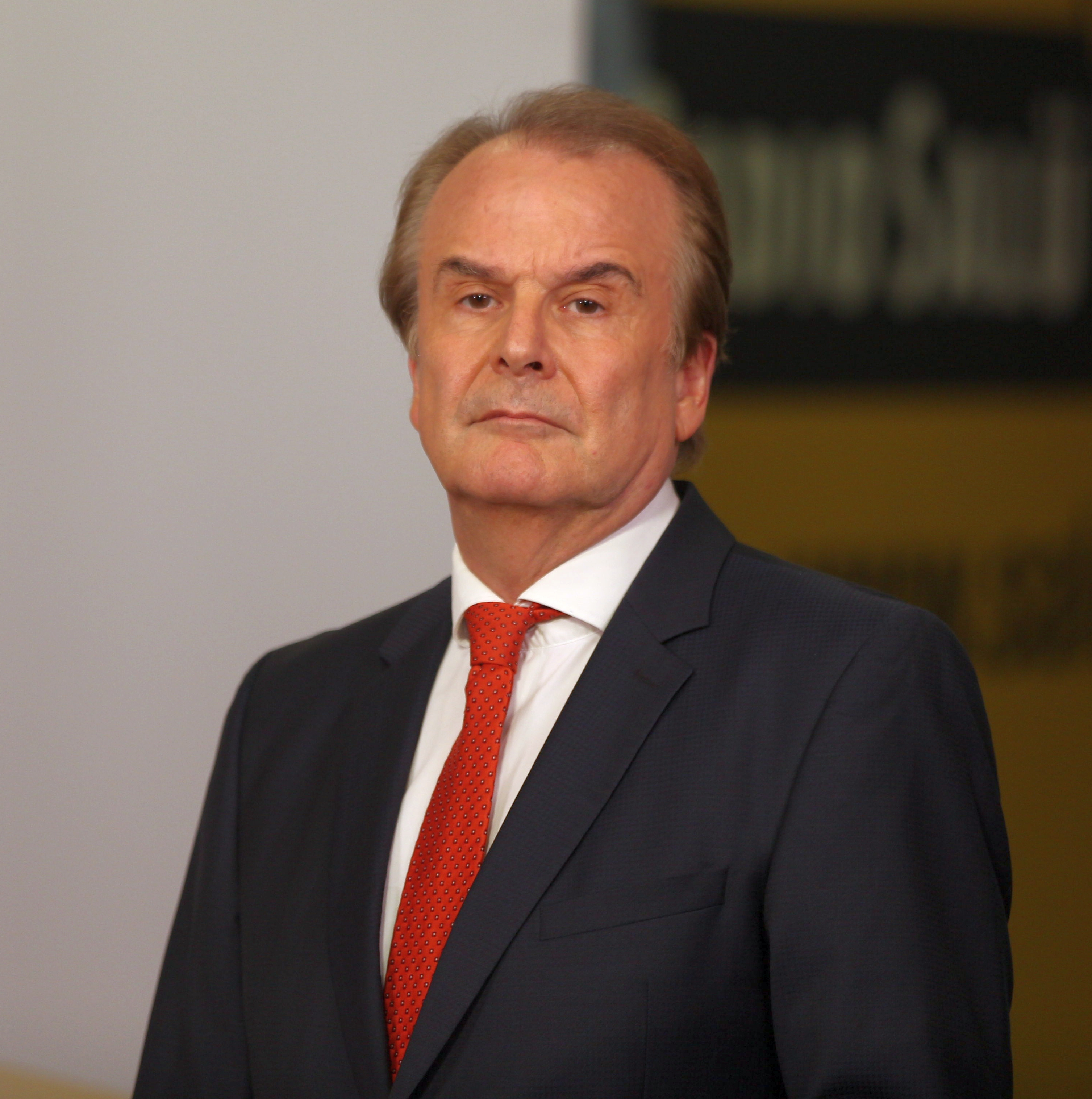 Alfred Schier (Phoenix) beim Wahlabend zur Landtagswahl im Saarland